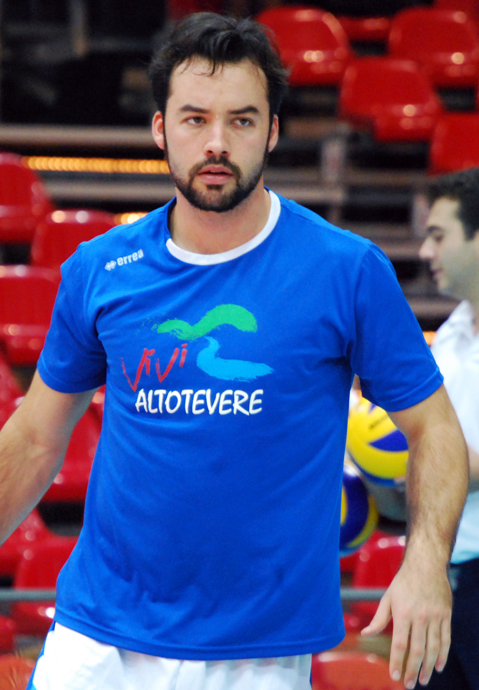 Partita Piacenza-San Giustino